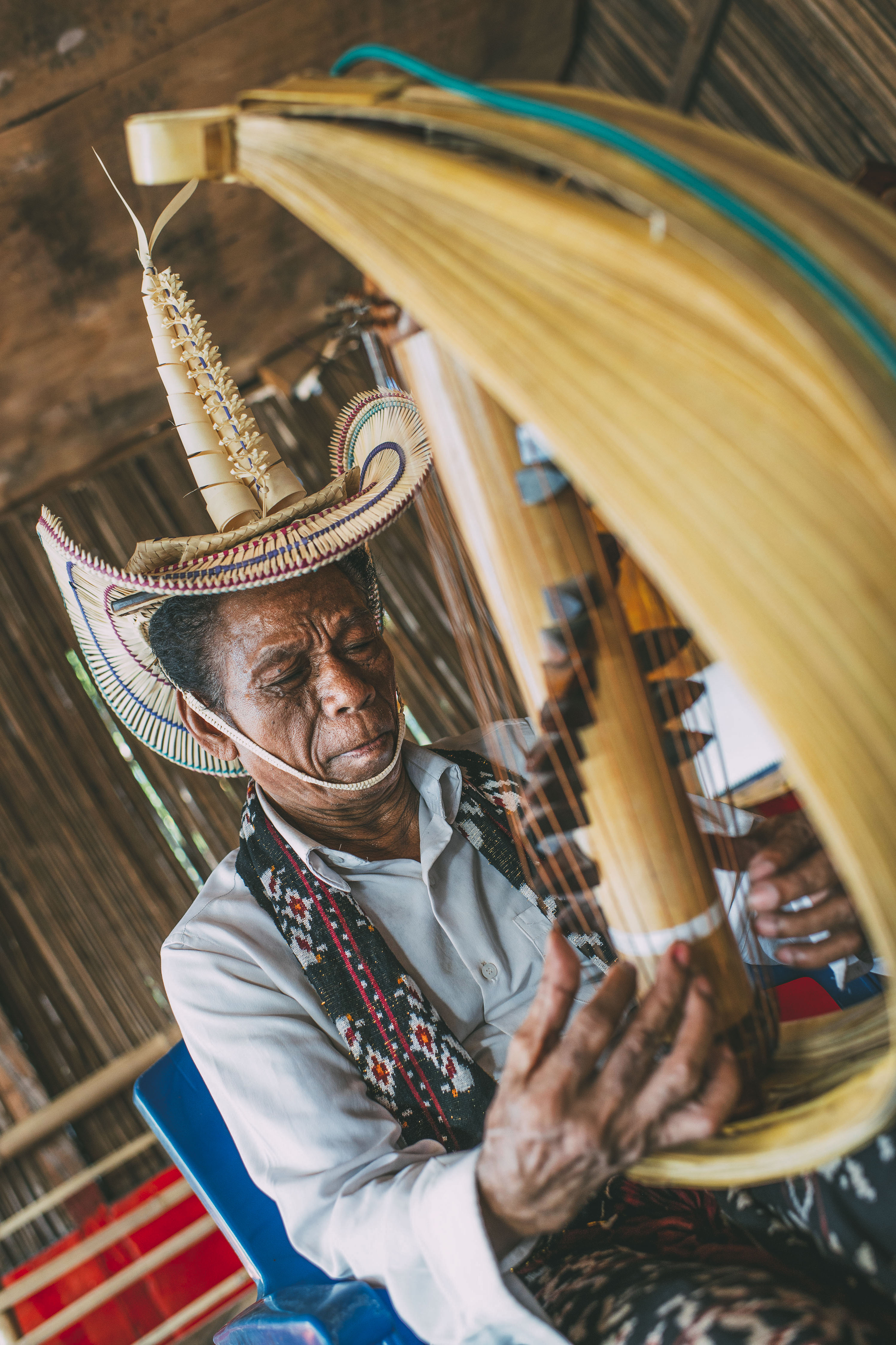 Sasando atau disebut Sasandu, merupakan alat musik asal Rote yang kini menjadi icon Provinsi NTT. Alat musik yang pernah hampir punah ini, kini kembali bersinar hingga mancanegara setelah perjuangan dari seorang maestro bernama Jeremias August Pah.